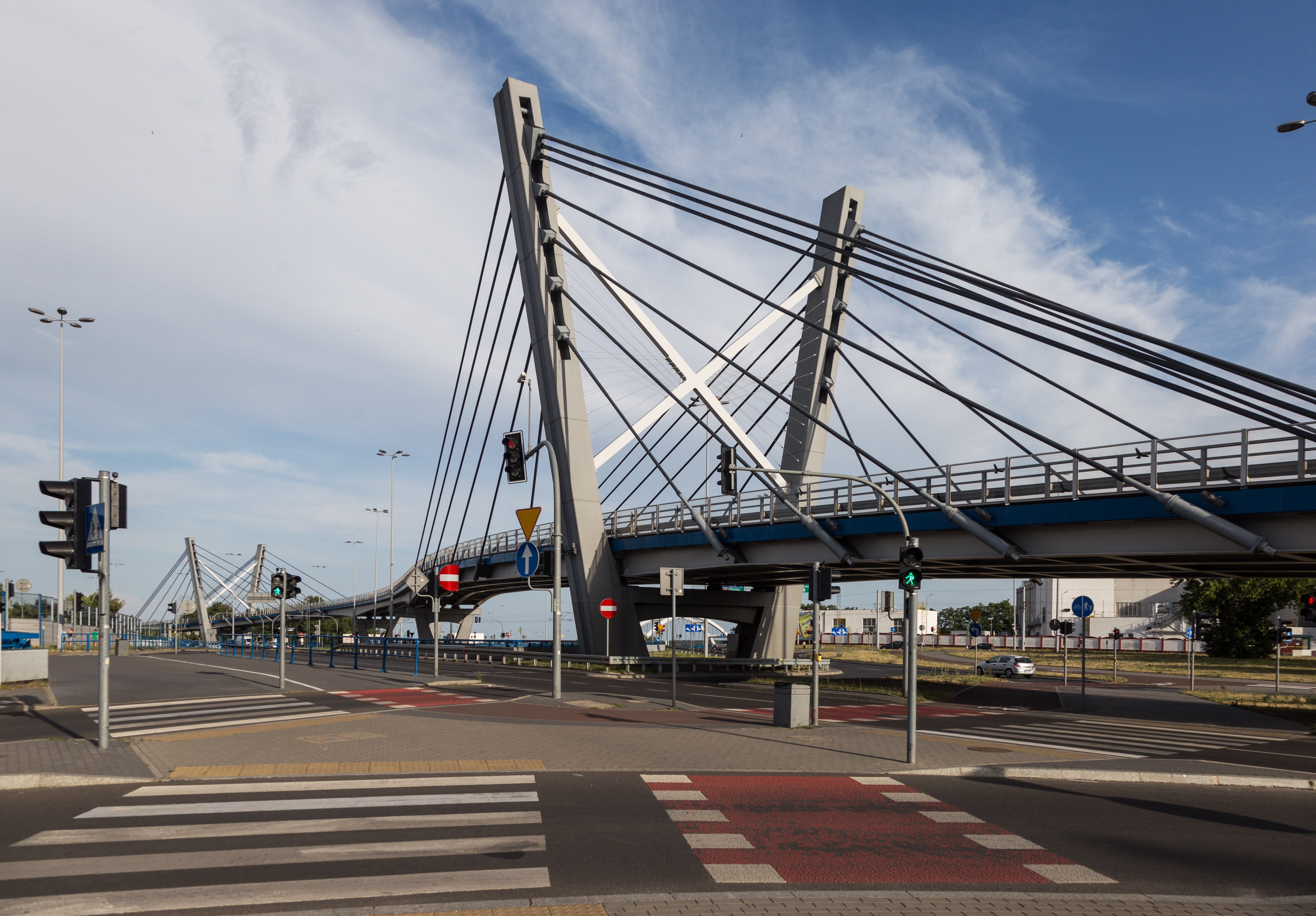 Estakada im Marka Sudaka w Toruniu - obiekt inżynieryjny związany z Mostem Drogowym im. gen. Elżbiety Zawackiej.